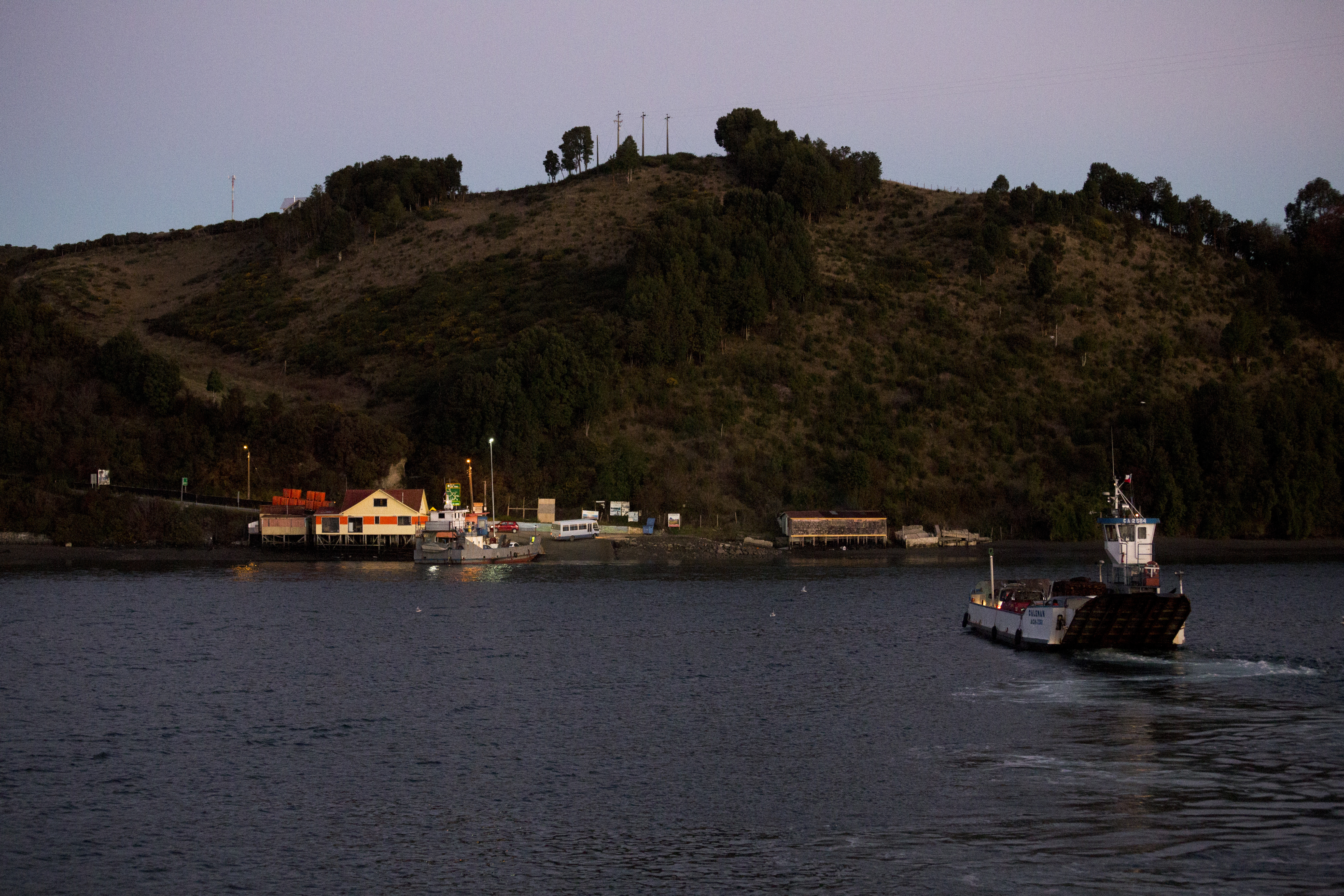 Barcaza llegando a La Pasada, Curaco de Vélez, isla Quinchao.